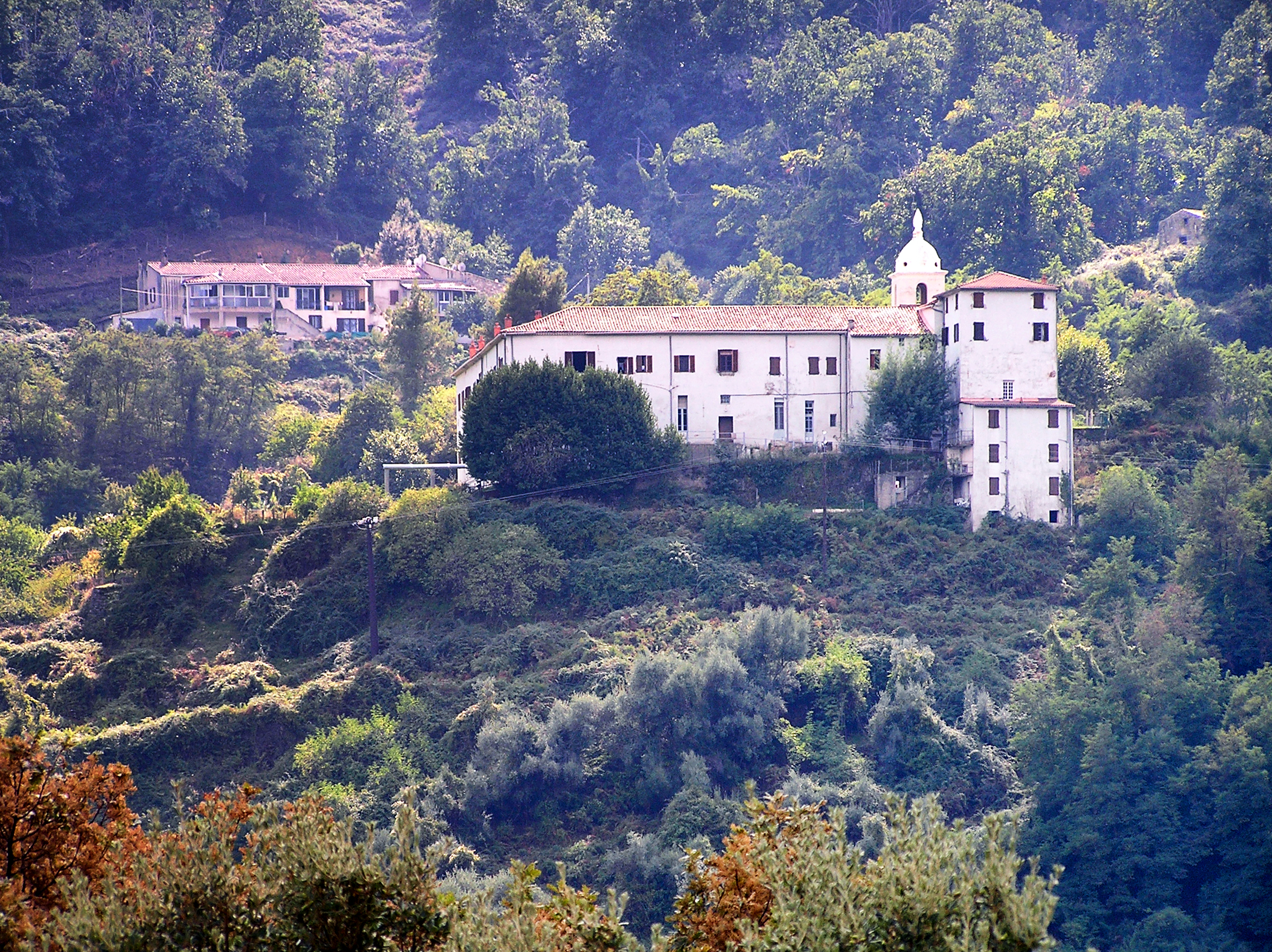 Vico, Ouest Corse - Couvent de Saint-François au hameau de Nesa